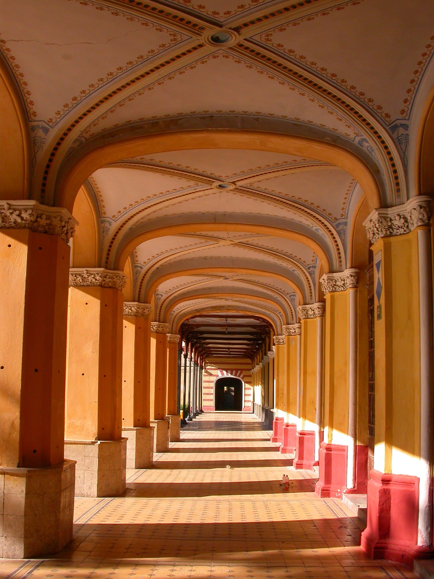 Ansamblul Cazinoului, 1850 - 1900 - înc. sec. XX